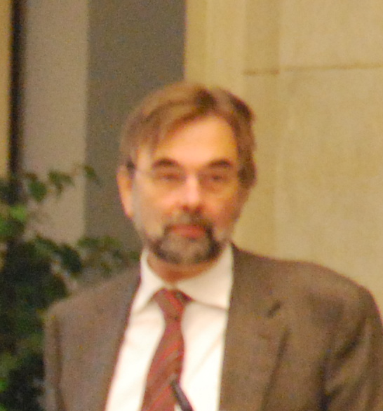 Internationale Tagung "Translatio nummorum" im November 2011 in der Berlin-Brandenburgischen Akademie der Wissenschaften.